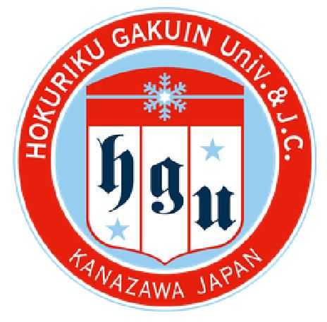 Logo der Hokuriku Gakuin University, Kanazawa, Japan